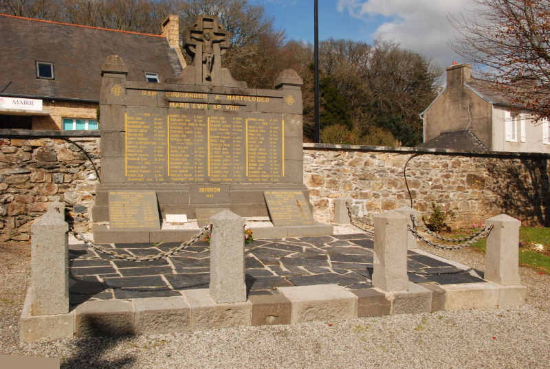 Monument aux morts - Dirinon-29